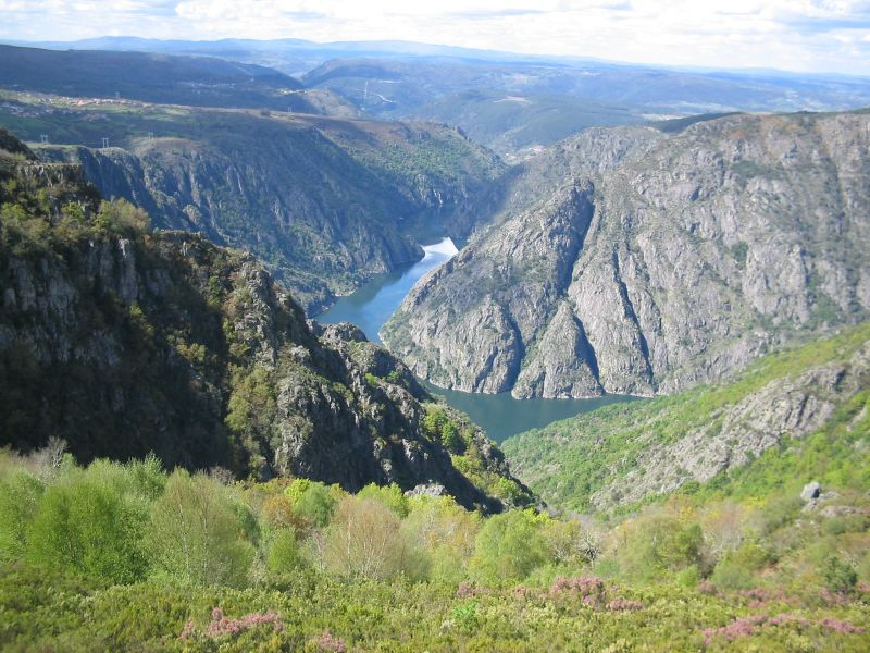 Ribeira Sacra. Río Sil. Lugo. Galiza